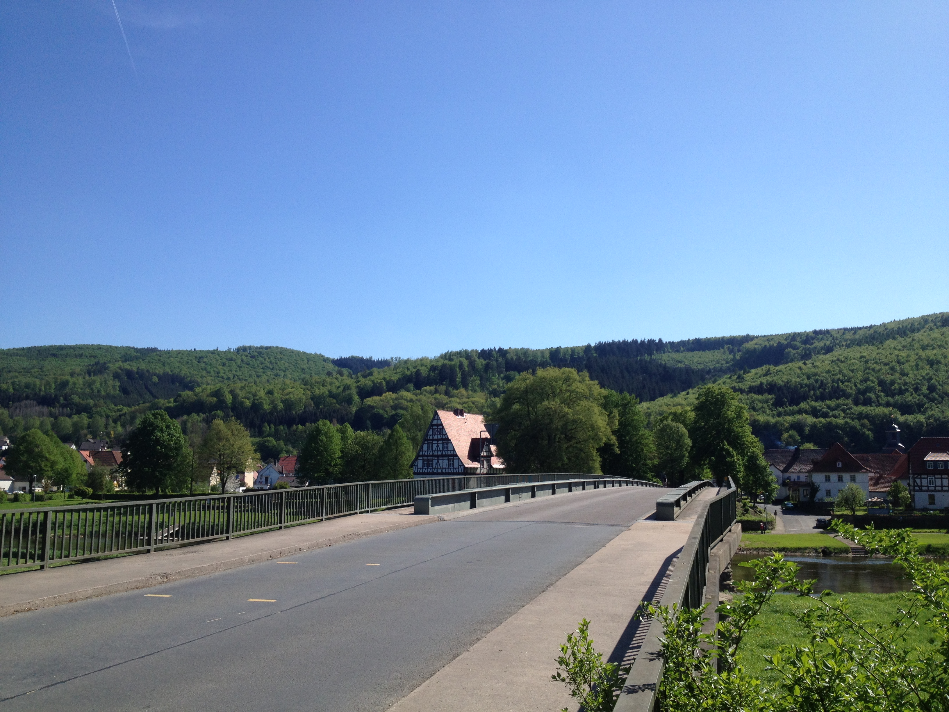 Die Wolfgang-Stremmel-Brücke über die Weser bei Gieselwerder. Einzige Brücke zwischen Hann. Münden und Bad Karlshafen